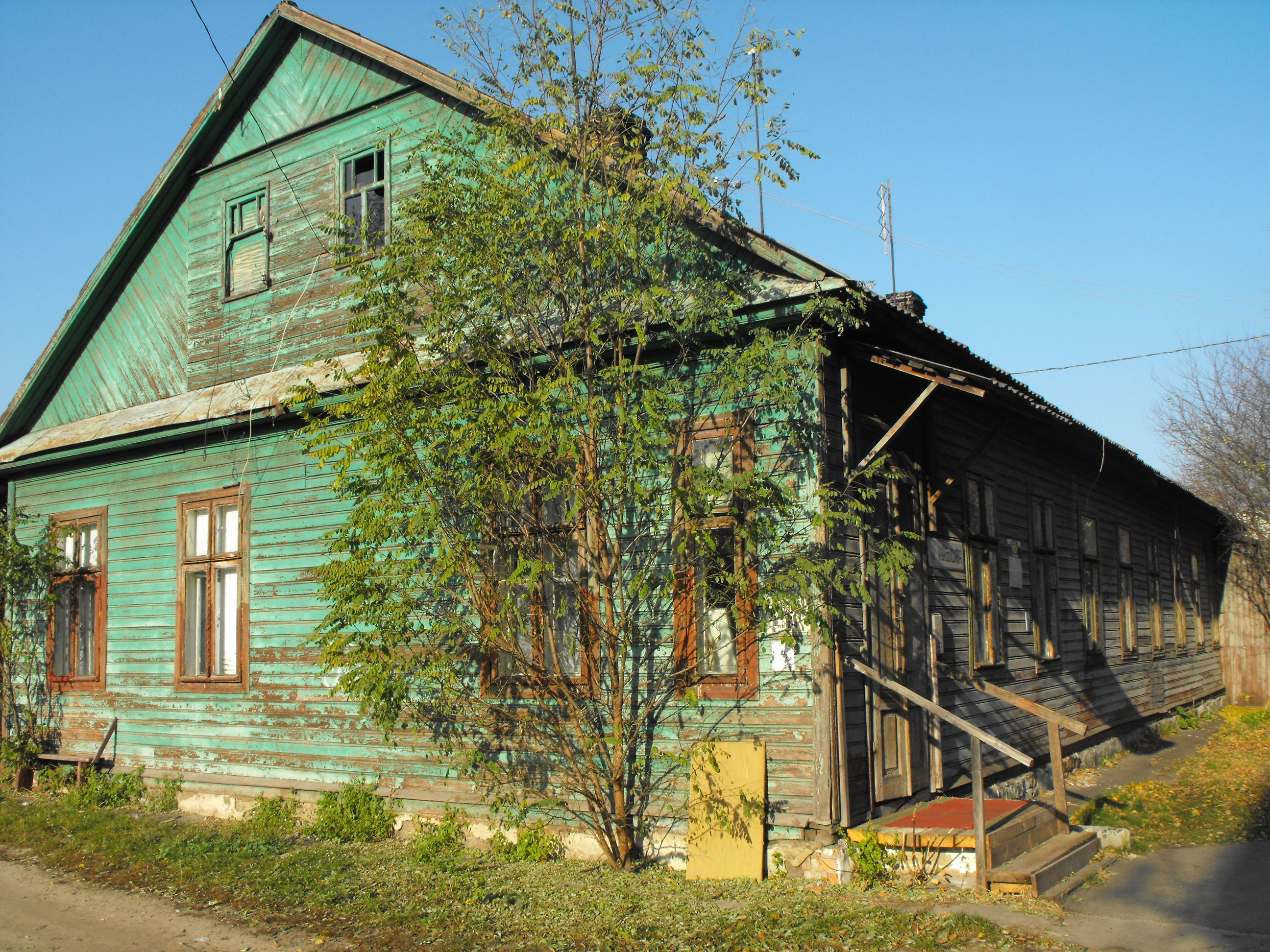 Дом № 87 на ул. Куйбышева, Брест, Беларусь (во время Второй мировой войны - ул. Длинная, на польском ul. Dluga, центр Брестского гетто). Построен в 1925 году.